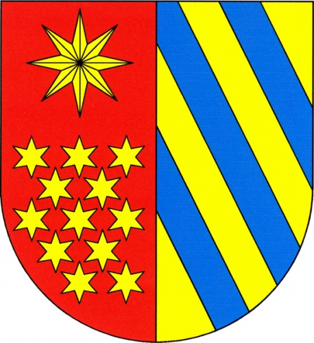 znak, Sudoměřice u Bechyně, okres Tábor